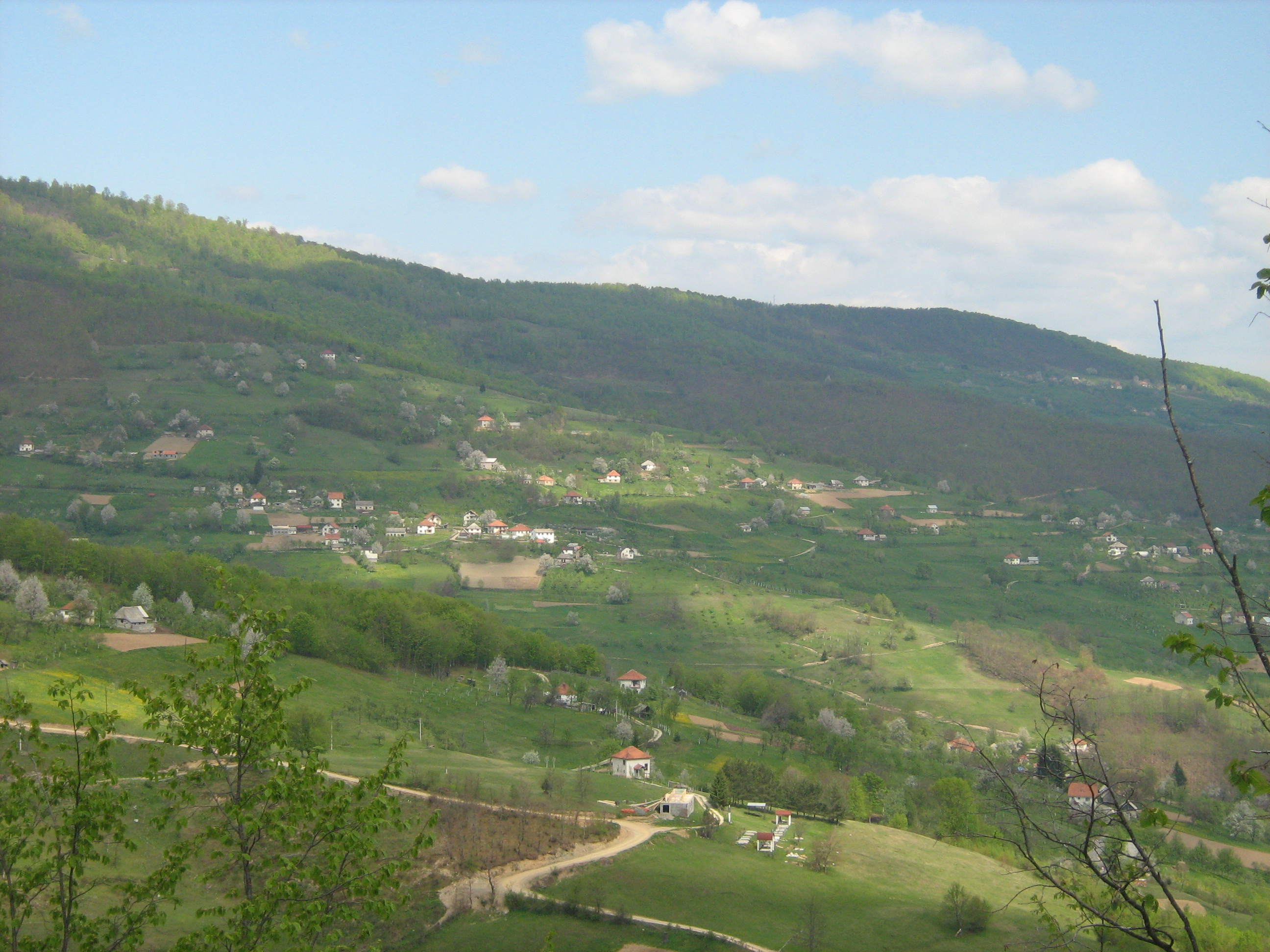 Пријелози, поглед са Ђевојачког кола